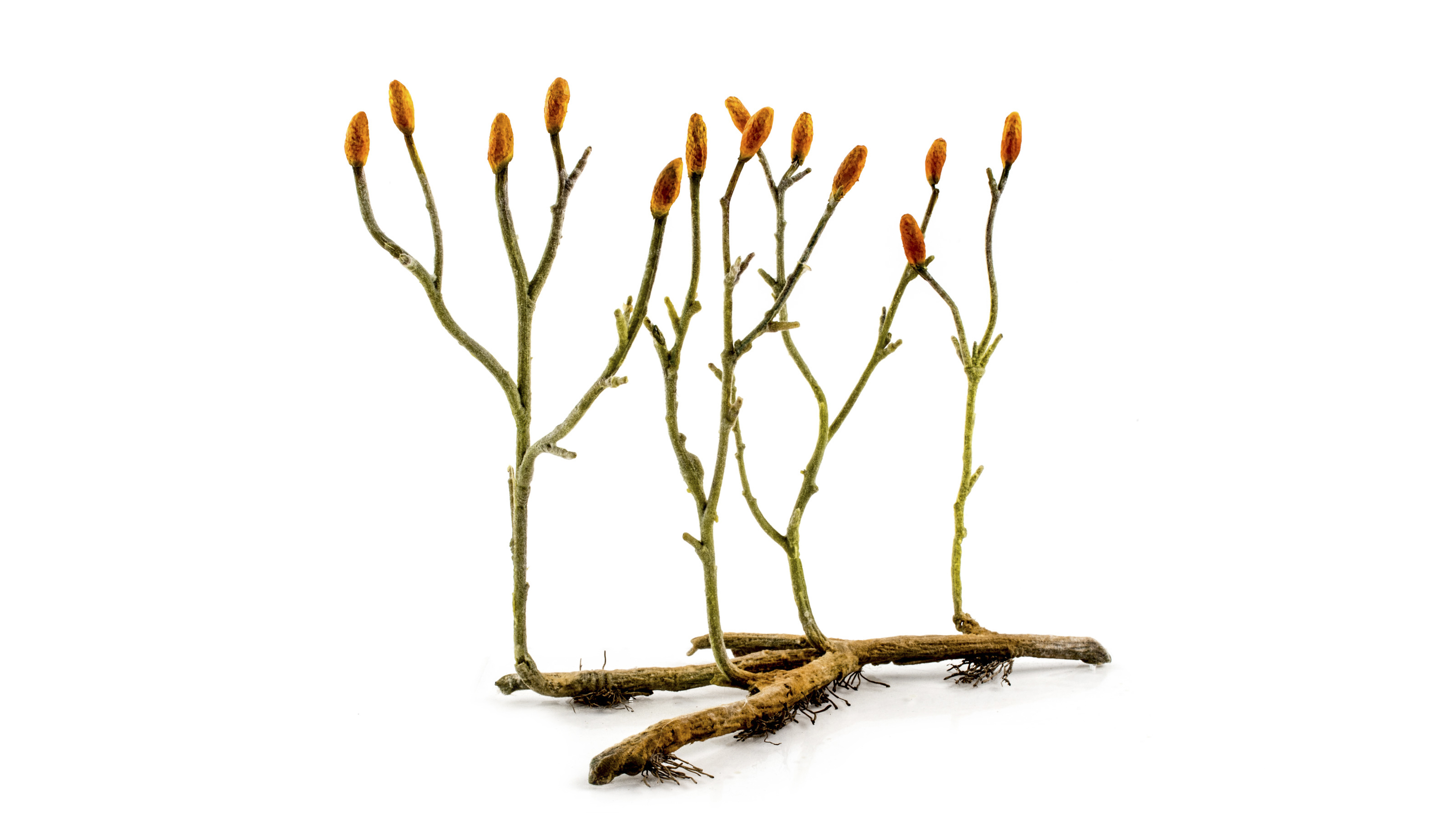 Ricostruzione in scala 10:1.